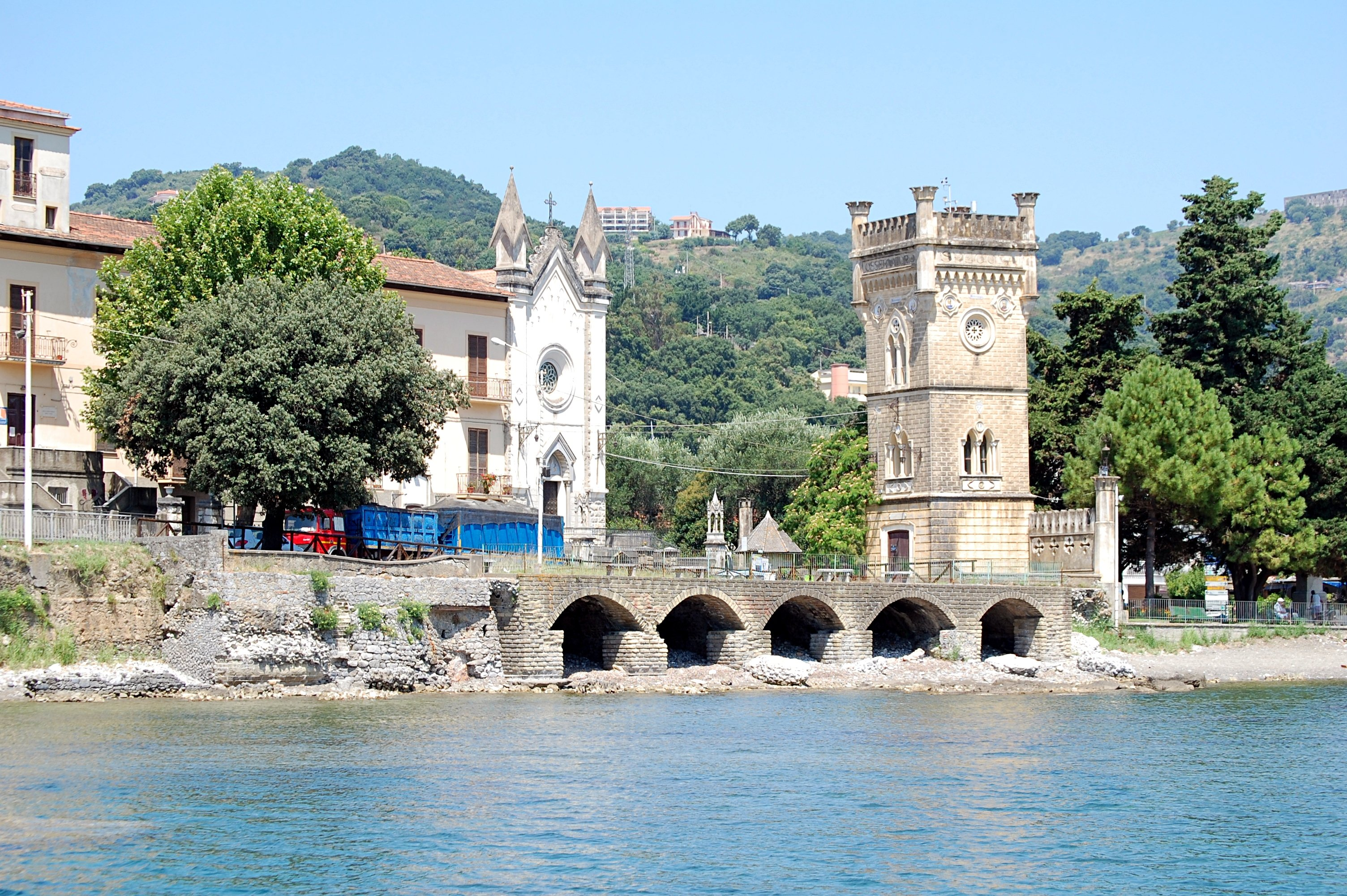 Chiesa di Santa Croce a Sapri, veduta dal mare.